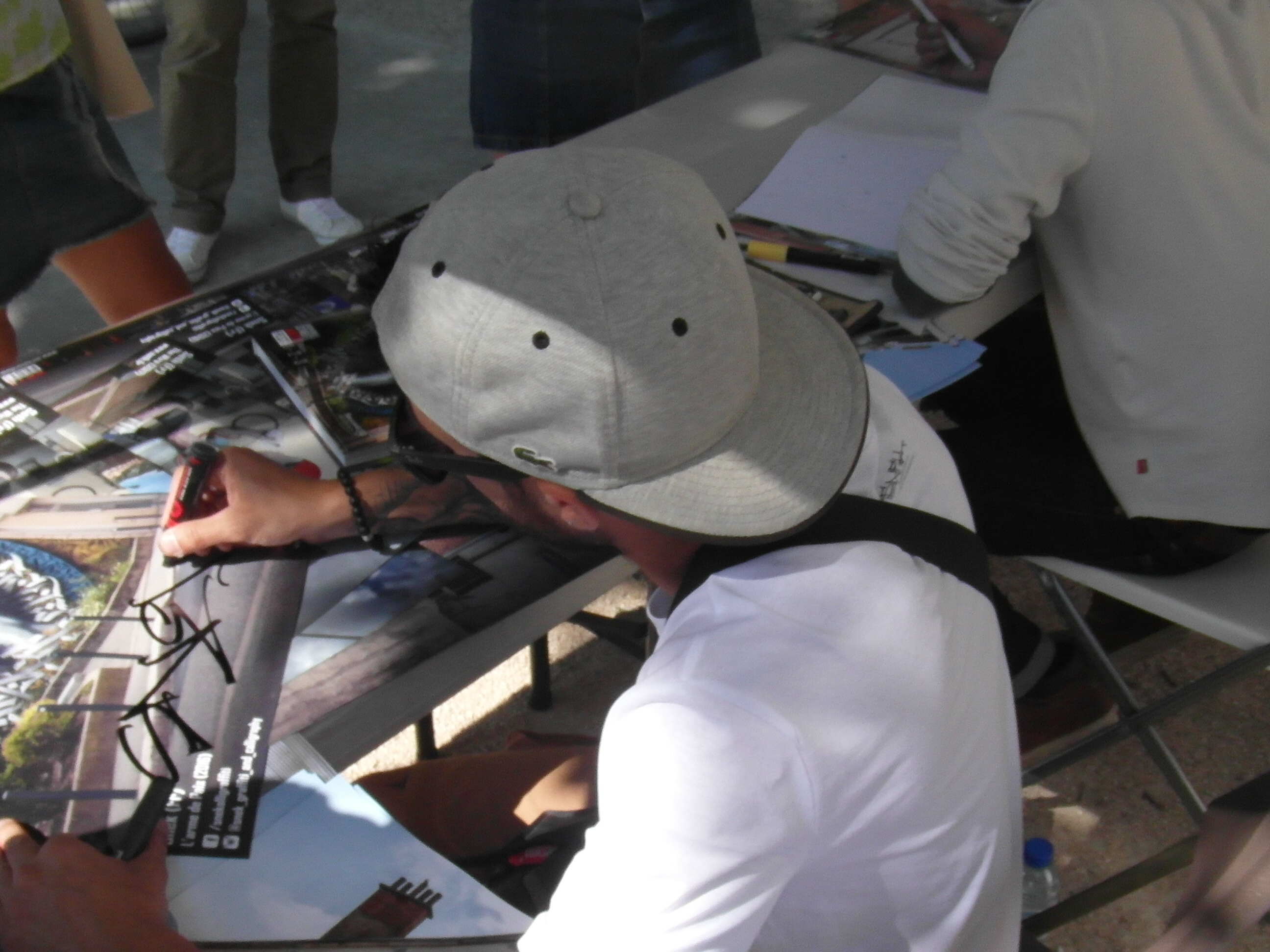 L'artiste Snek signant des dédicaces lors du GSA Fest 2018